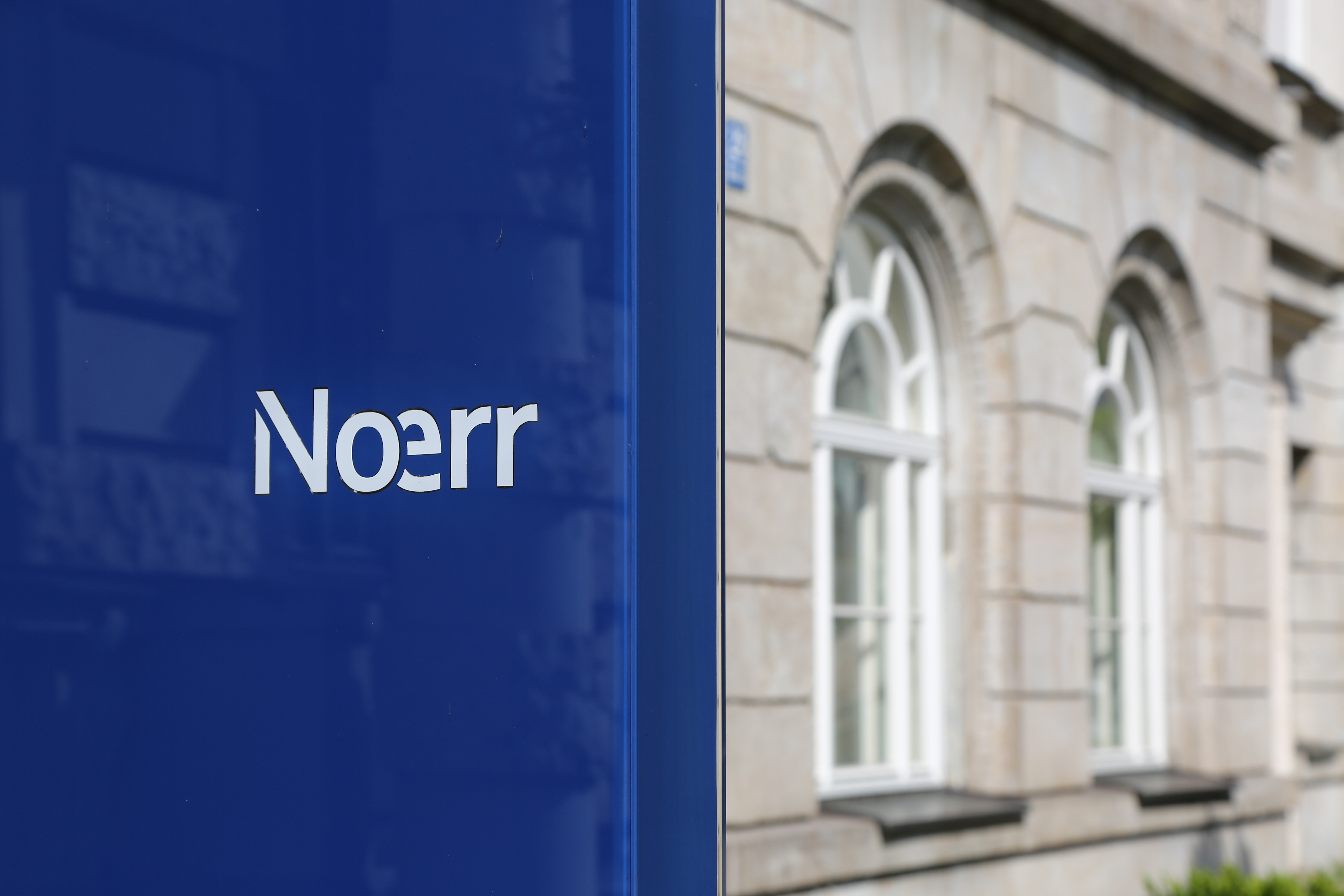 Firmenschild der Noerr LLP in der Münchner Briennerstraße